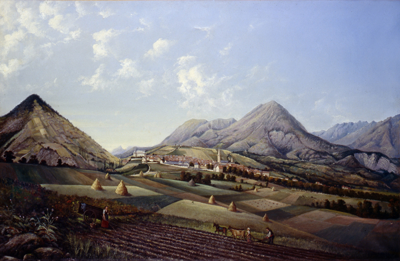 "La Mure en 1891" huile sur toile de Charles-Emile Desmoulins (1829-1900).